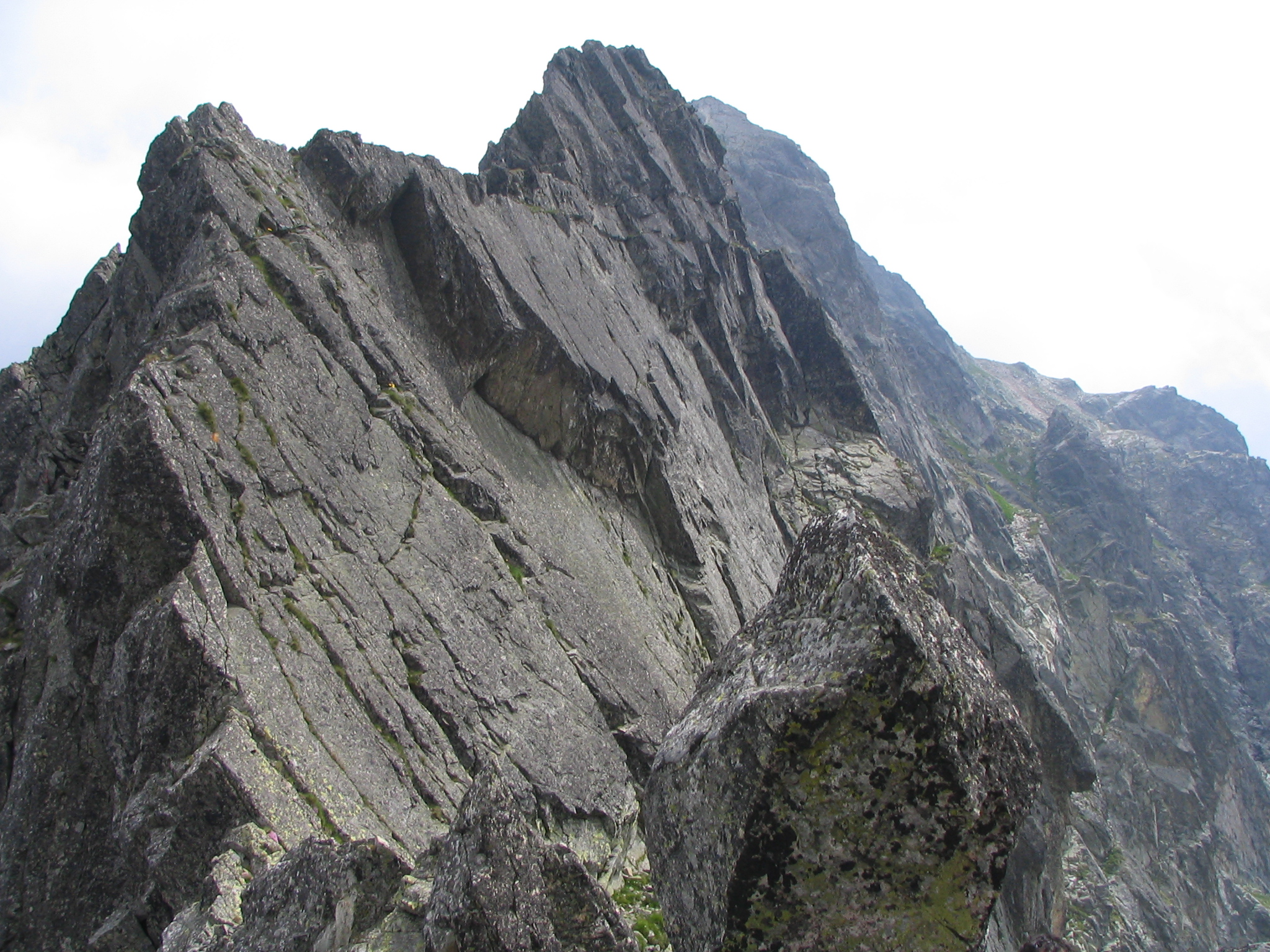 Widok z Orlej Perci na południową ścianę Zamarłej Turni